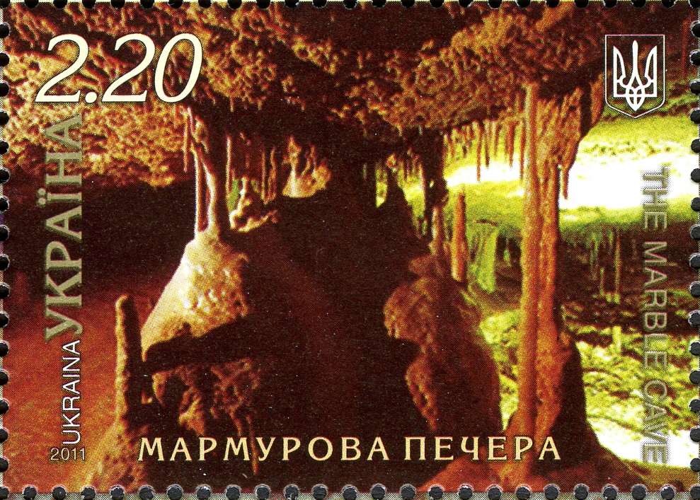 Мармурова печера на марці, присвяченій проекту "Сім природніх чудес України"